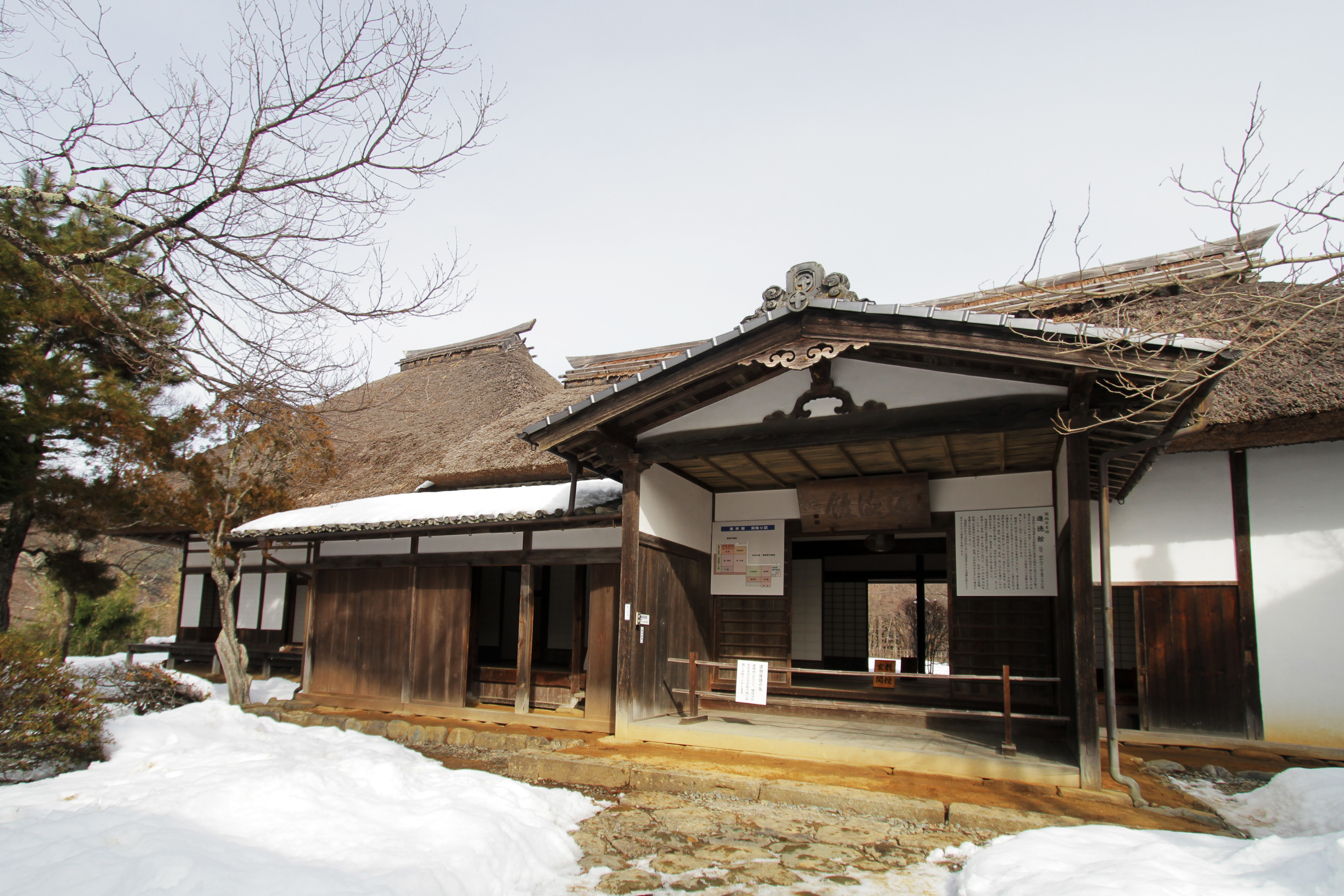 shintoku-kan